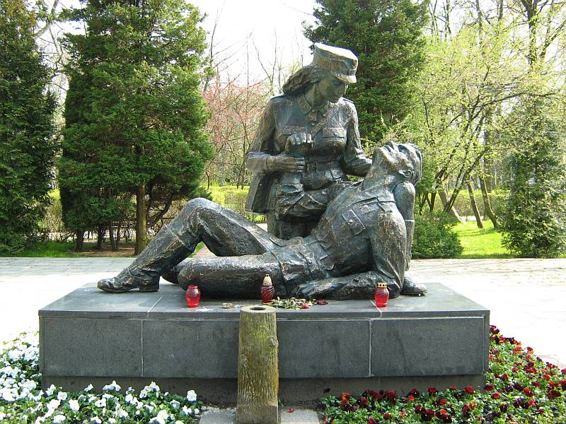 Pomnik Sanitariuszki w Kołobrzegu. Widok od strony północnej.